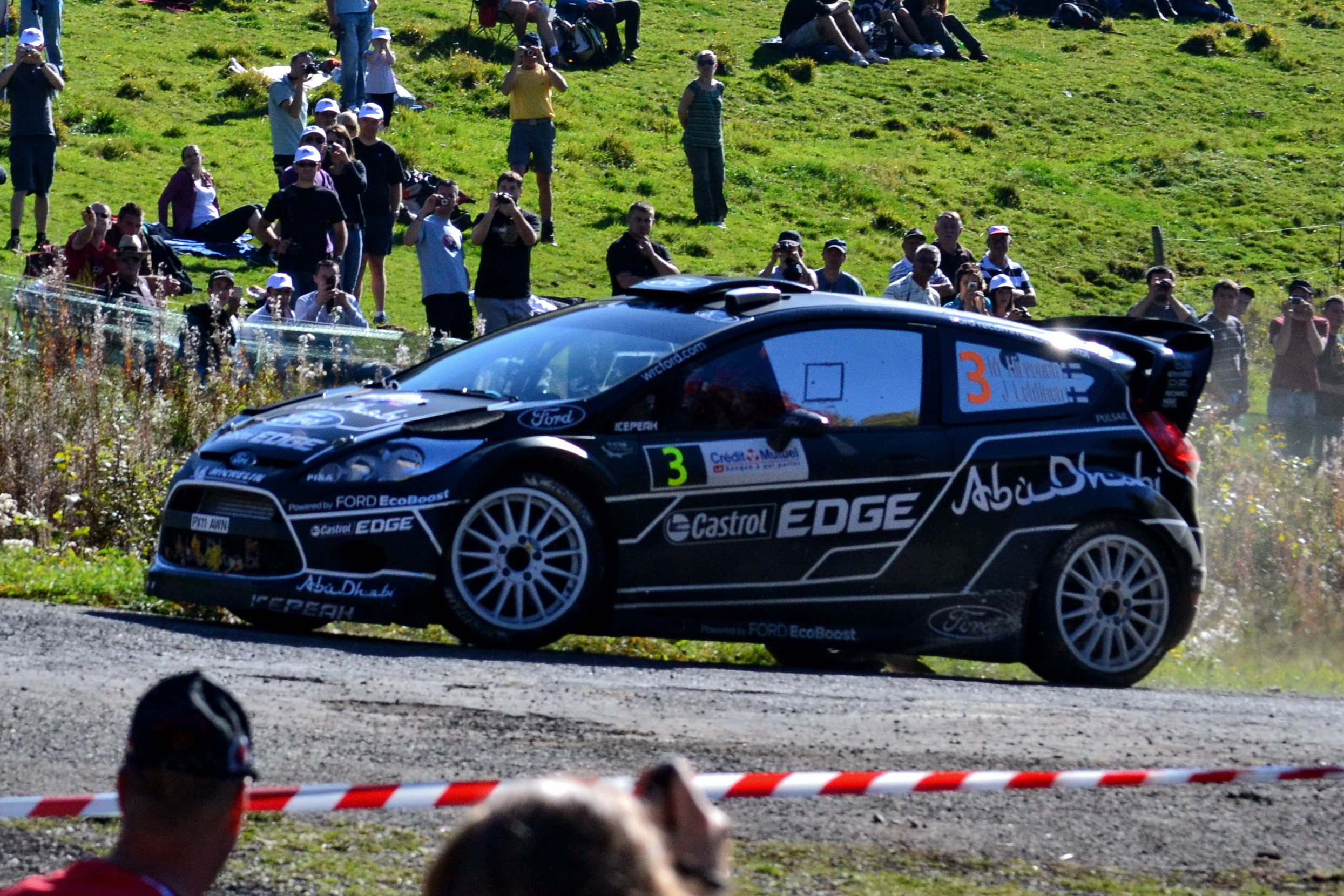 Rallye WRC France 2011, ES12 Grand Ballon. Ford Fiesta RS WRC - Mikko Hirvonen/J. Lehtinen